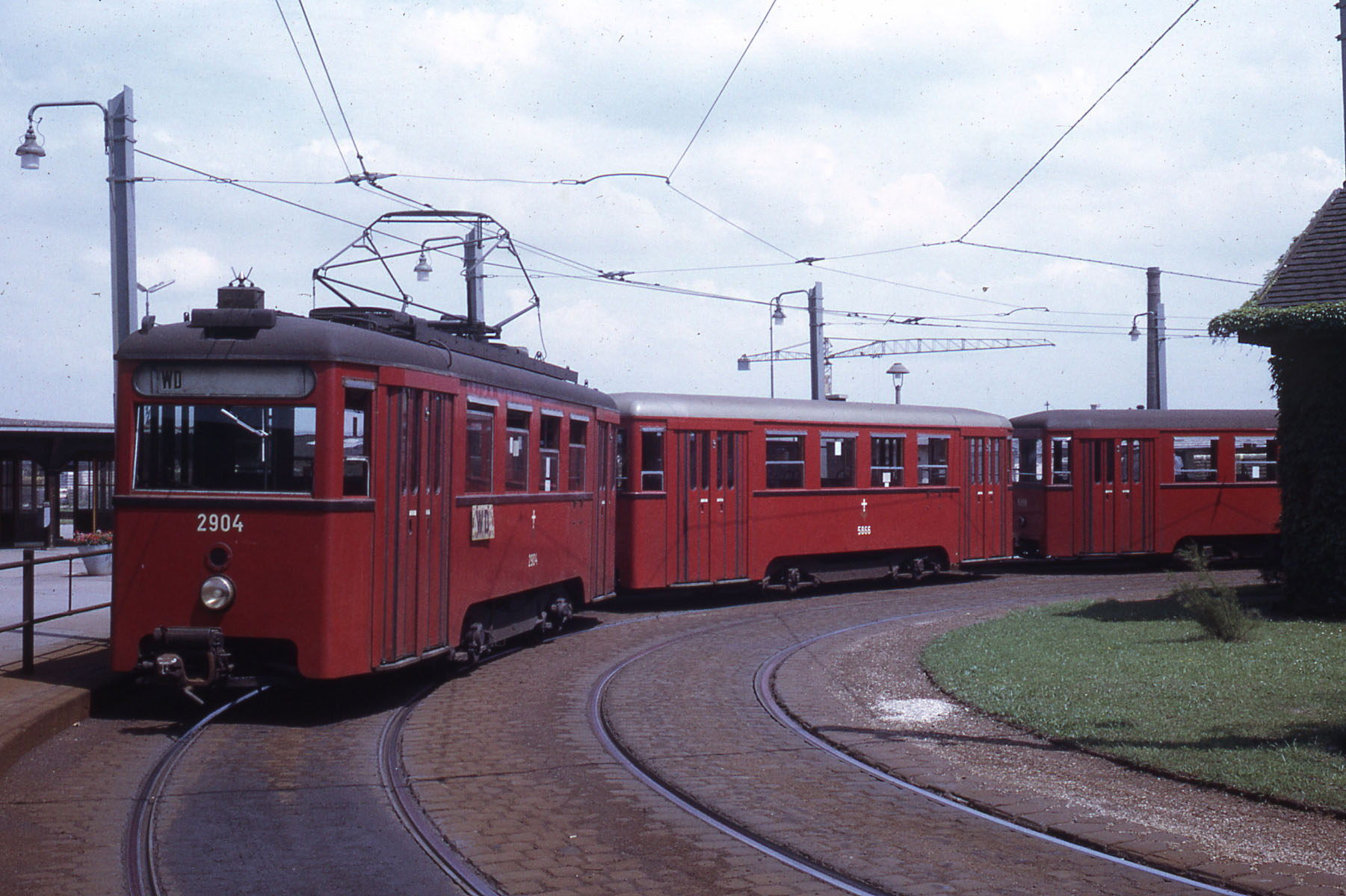 Linie WD, Schleife Heiligenstadt.